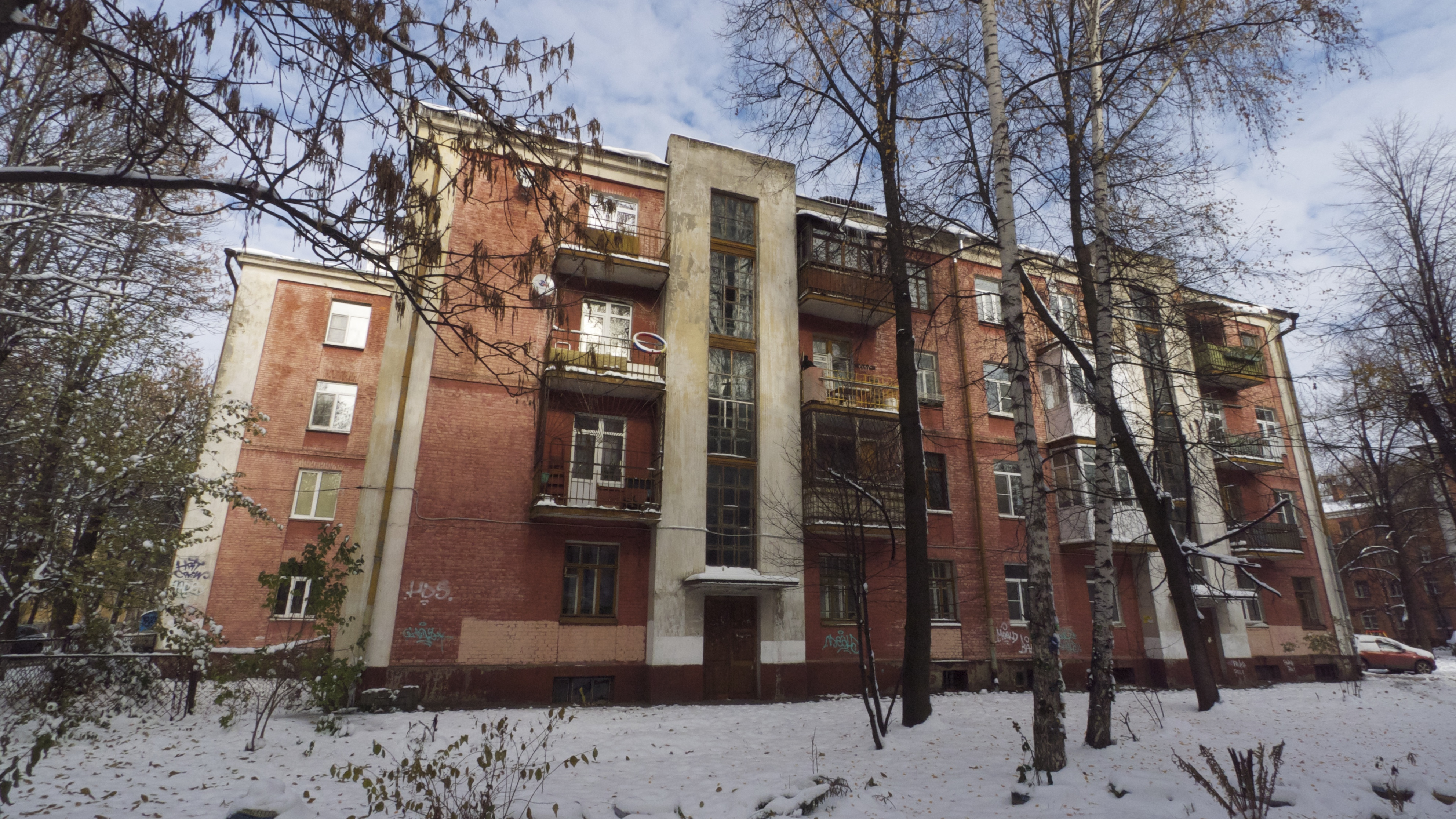 Жилой комплекс (Ярославская область, Ярославль, Свердлова улица, 21, 21-а, 23, 23-а, 25)